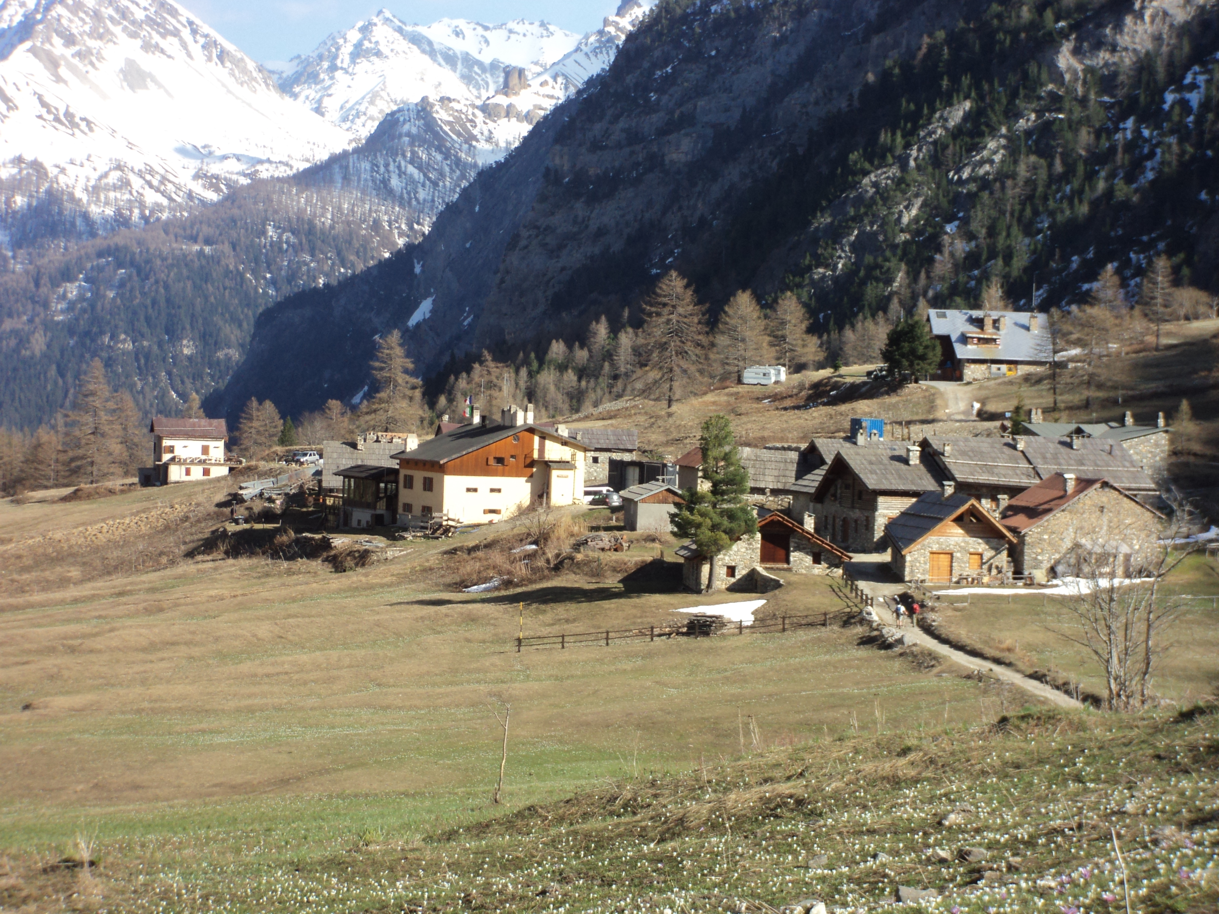 Grange di Valle Stretta - Comune di Nevache - Alte Alpi - Francia